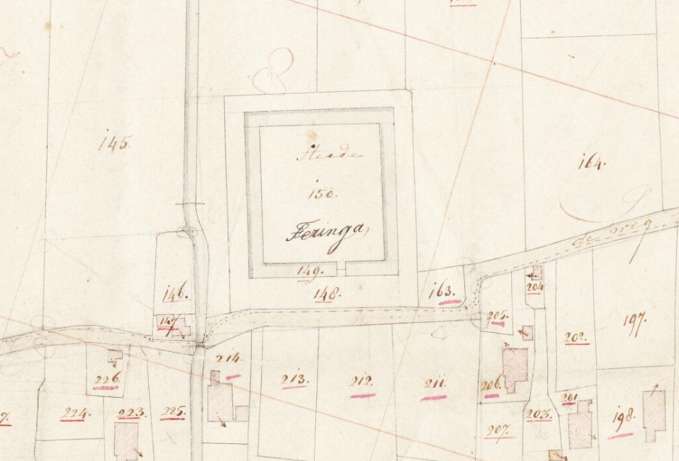 Kadasterkaart Grootegast door H.F. Feringa (1832). De borgstee van Feringa.